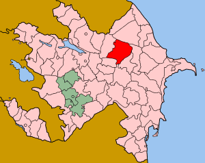 Map of Azerbaijan showing Ismailli (İsmayıllı) rayon.